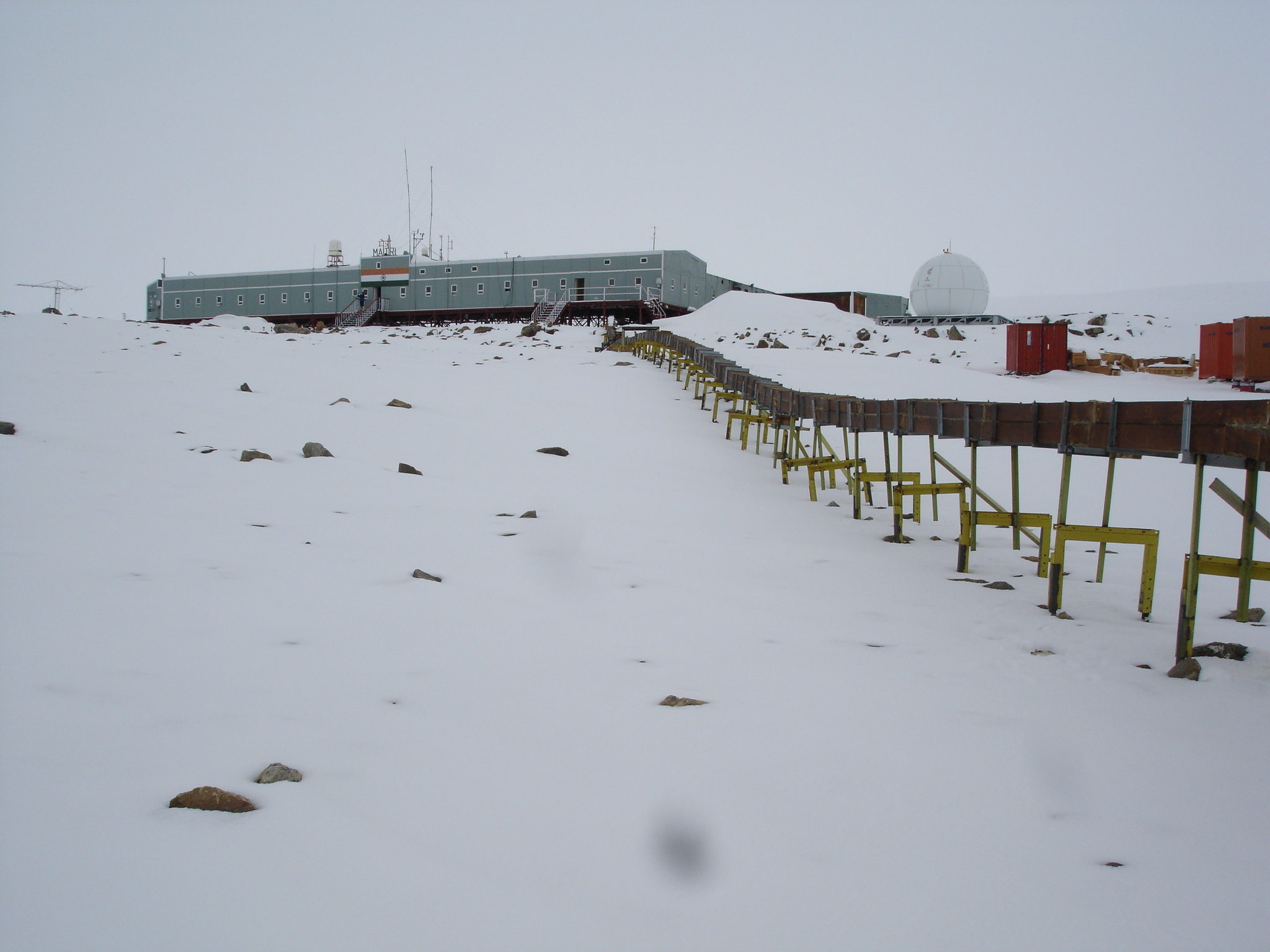 मैत्री, भारतीय स्टेशन